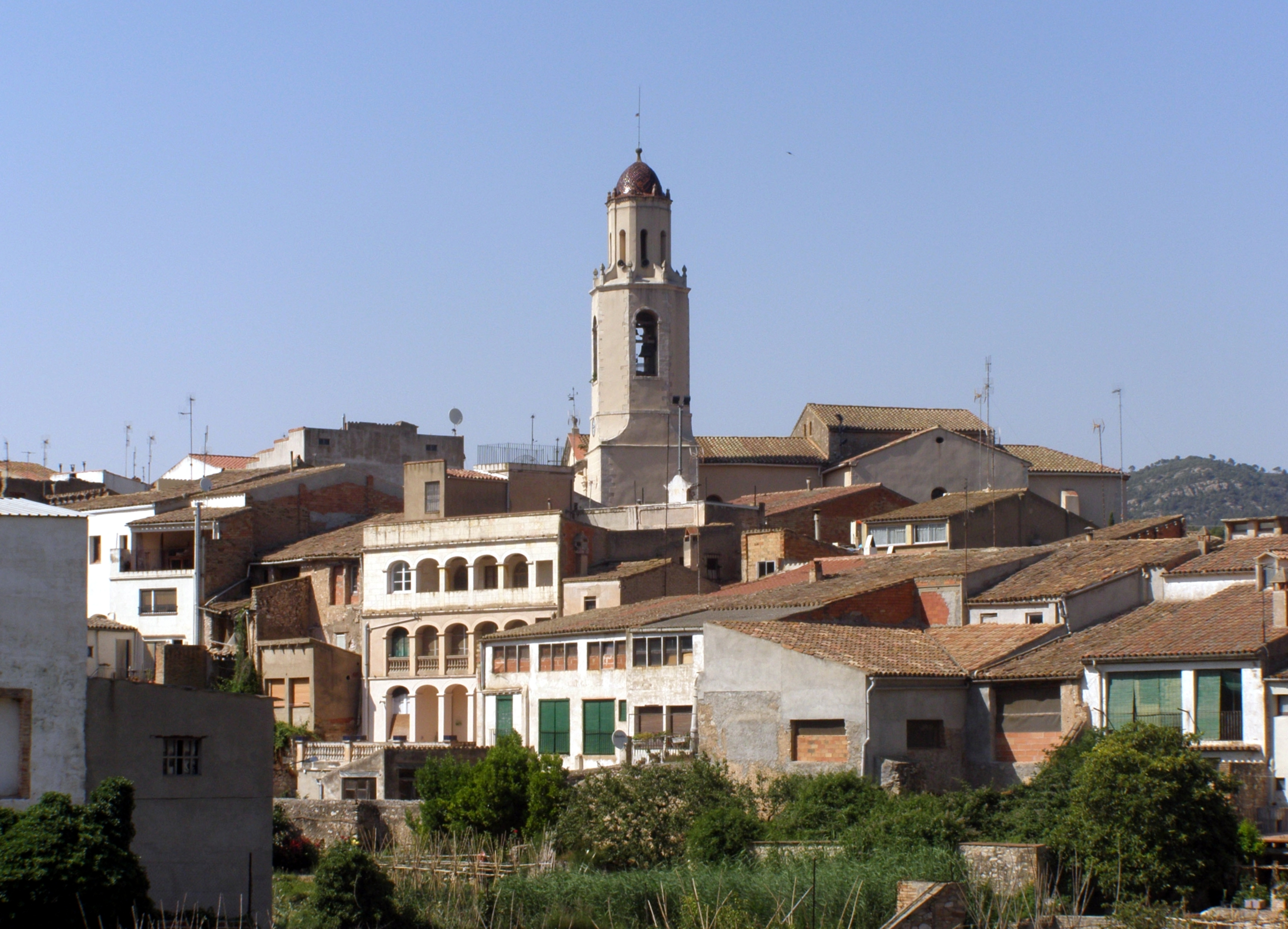 Esta foto participó en el juego En un lugar de Flickr.